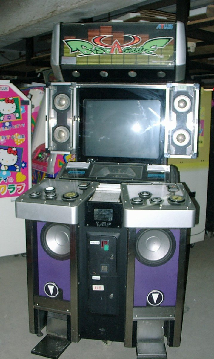 Cette borne d'arcade est une adaptation par Atlus et Namco du jeu Bust a Groove, un jeu de danse. Elle permet de jouer à un ou deux joueurs.